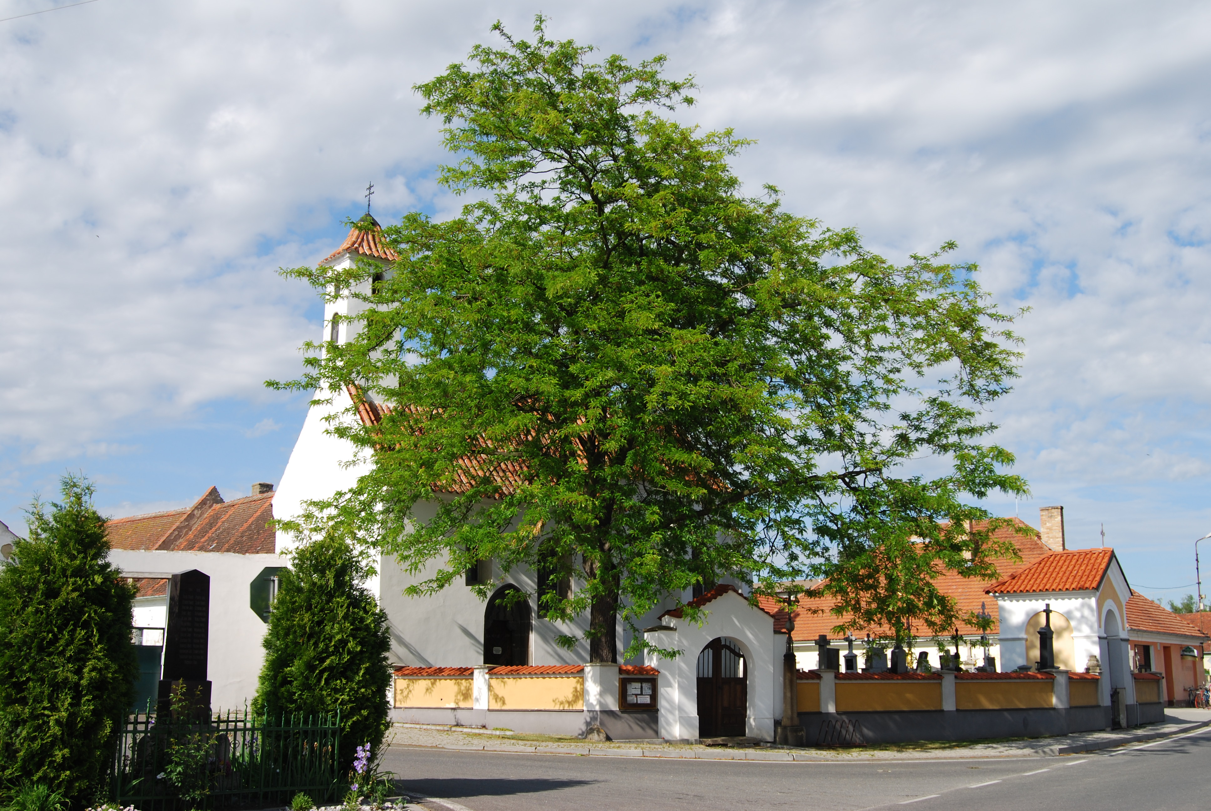 Pohled na kostel svaté Brikcí, hřbitov, pomník a část návsi. Dobev je obec v Jihočeském kraji v okrese Písek. Česká republika.